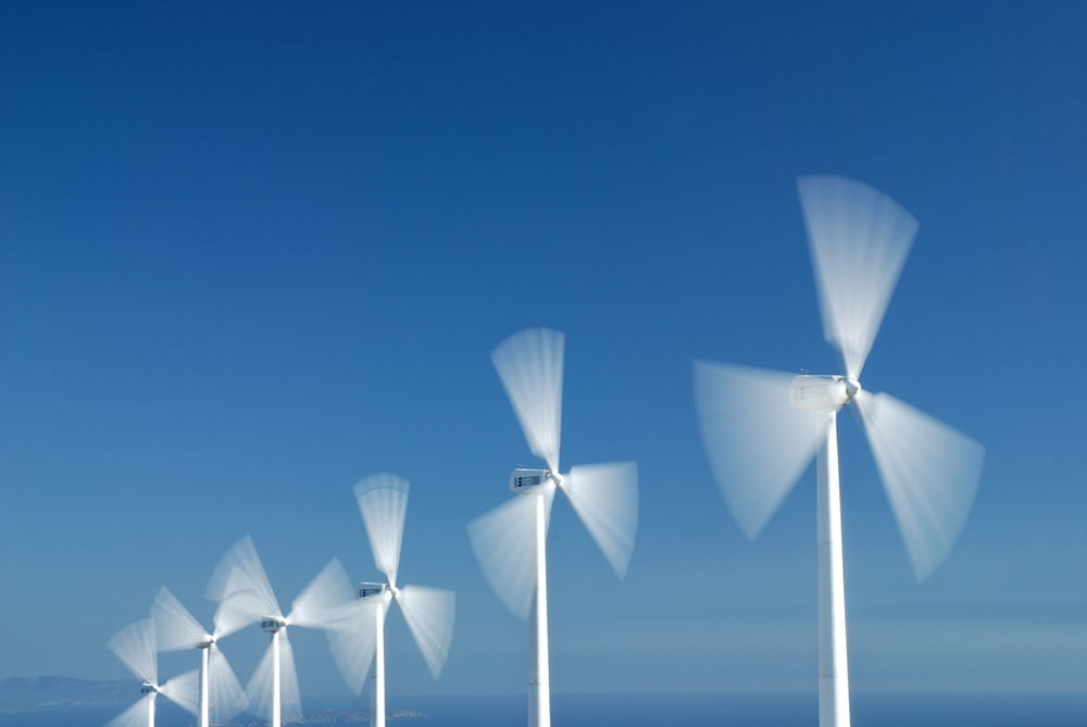 Eolic Park @ Serra do Barbanza, Coruña, Galiza. ( Spain, 2008 )